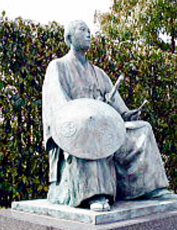 Ikutaro Tokoro